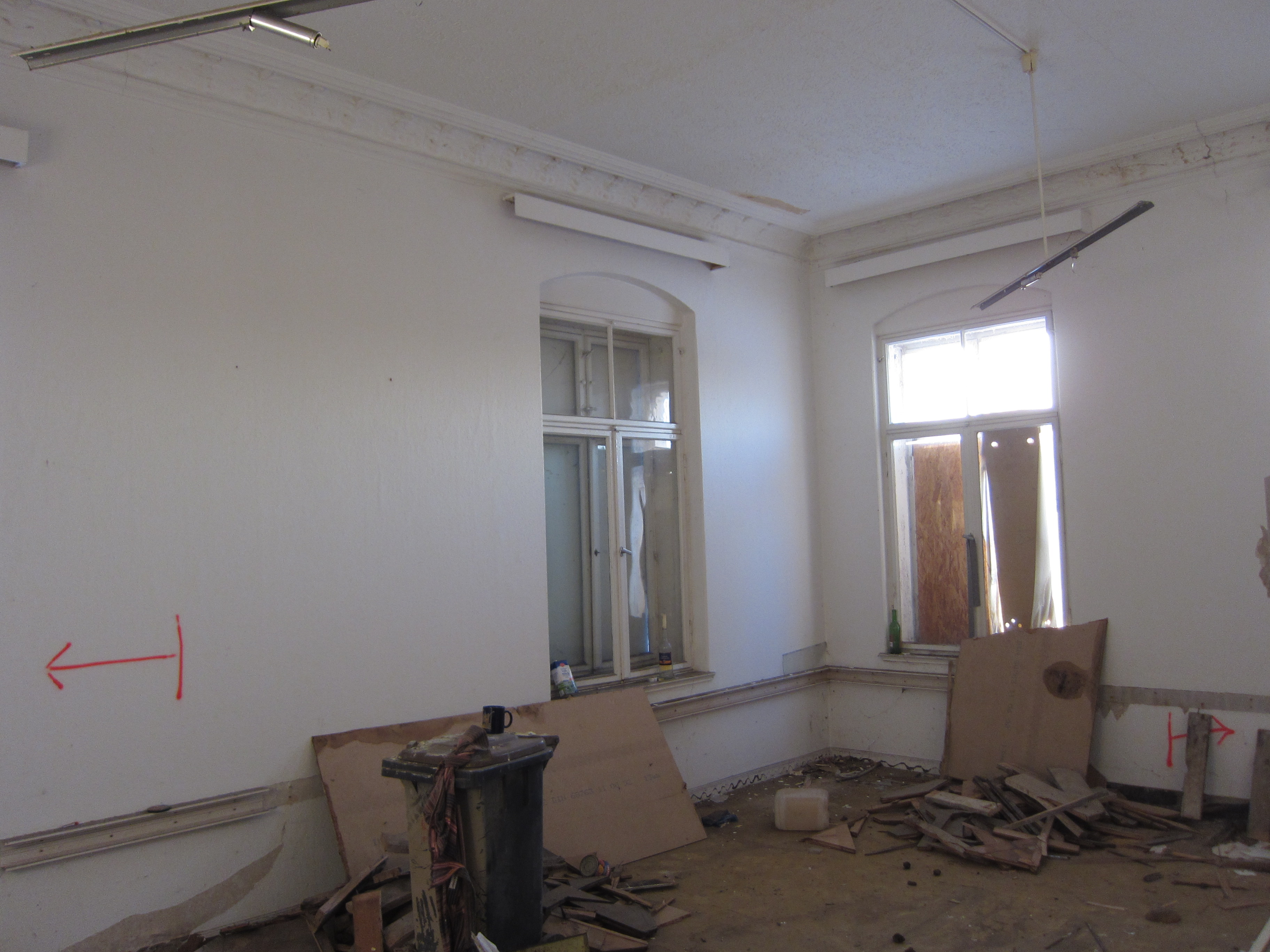 Die Villa Leipziger Straße 27 ín Dresden Anfang 2016 vor Beginn der Sanierung. Raum im 1. Obergeschoss.